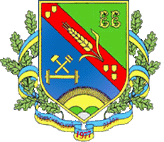 Герб Попаснянського району